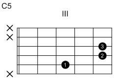 Eigenanfertigung